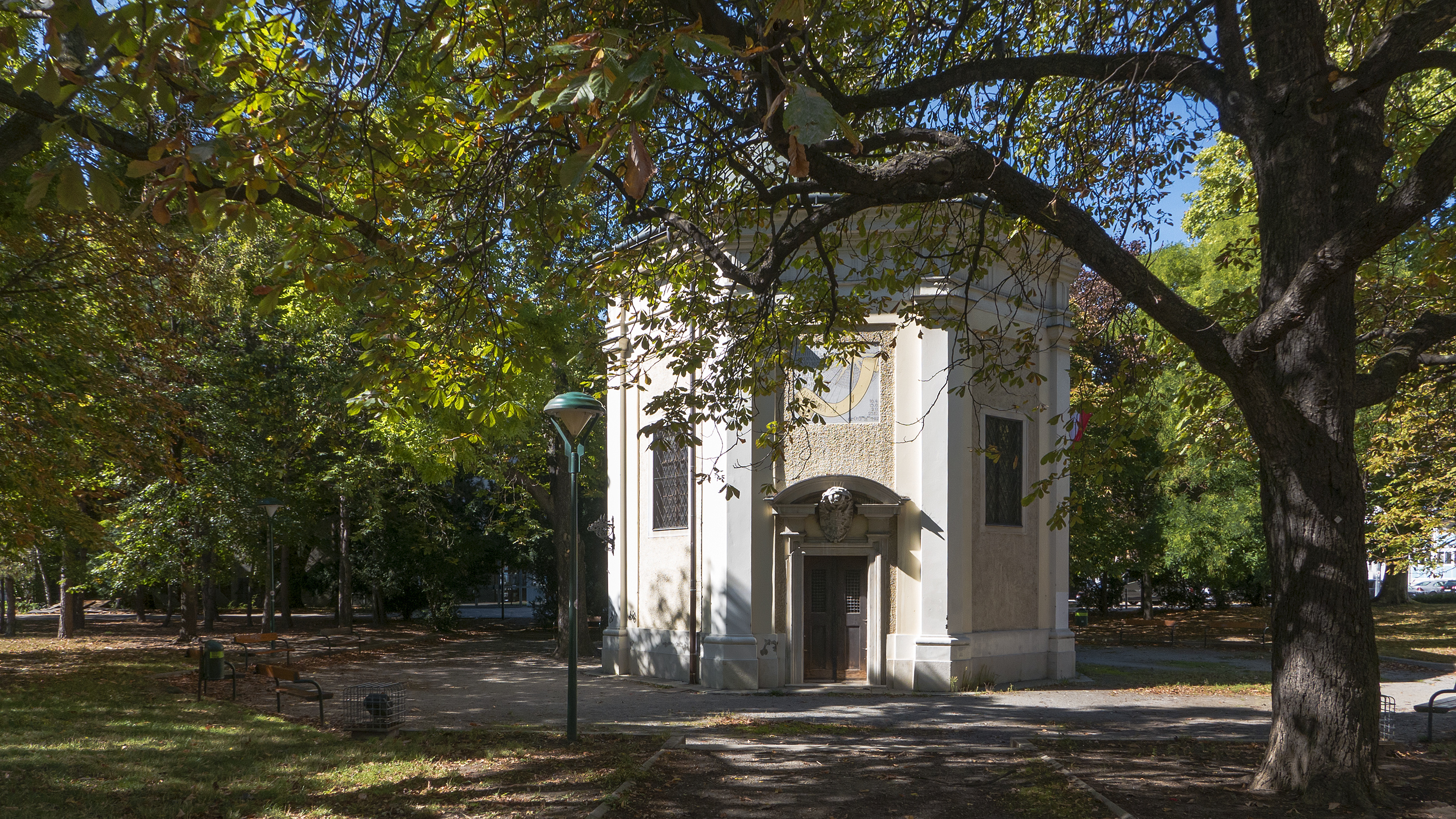 Forsthauspark in Wien 20, Brigittakapelle